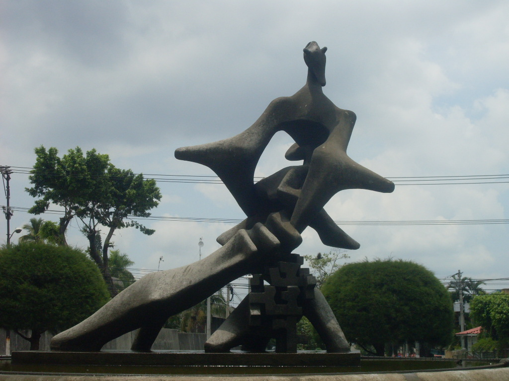 Monumento al Mar